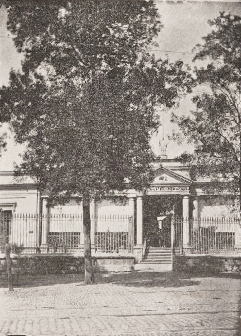 Hospital de San Vicente de Paul en Santiago de Chile (1903)